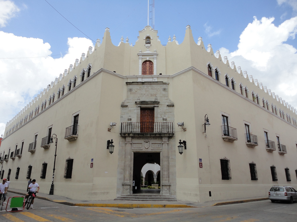 UADY